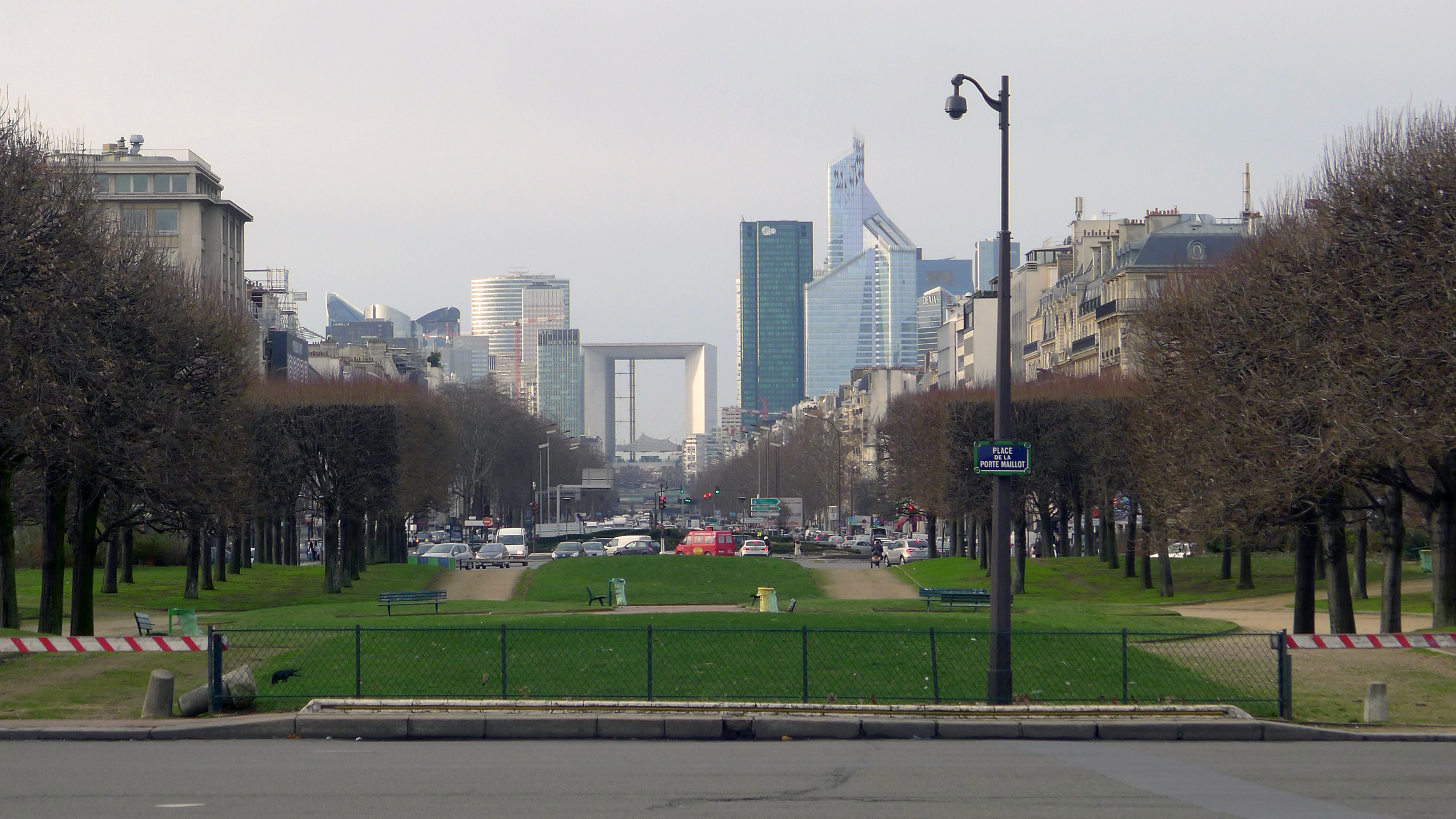 Place de la Porte-Maillot - Paris XVI et XVII